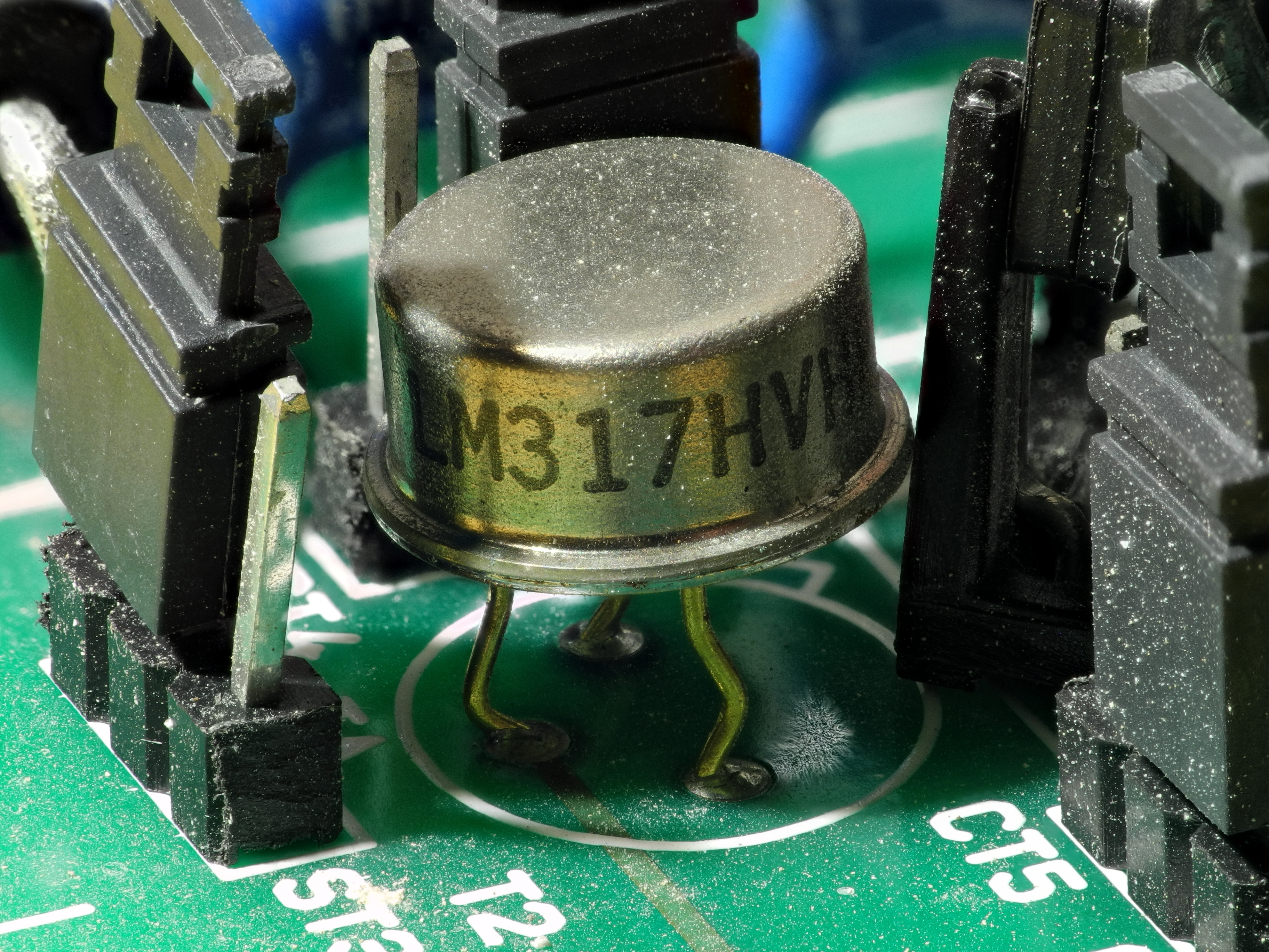 Focus stacking of 22 pictures (using Zerene Stacker).Composants électroniques (focus stacking). Image composée de 22 photos prises avec la bonnette Raynox DCR-250 et assemblées avec Zerene Stacker.